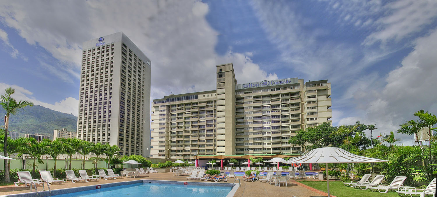 Antiguo Hotel Hilton de la ciudad de Caracas, Venezuela